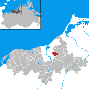 Bentwisch in Mecklenburg-Western Pomerania - District Bad Doberan